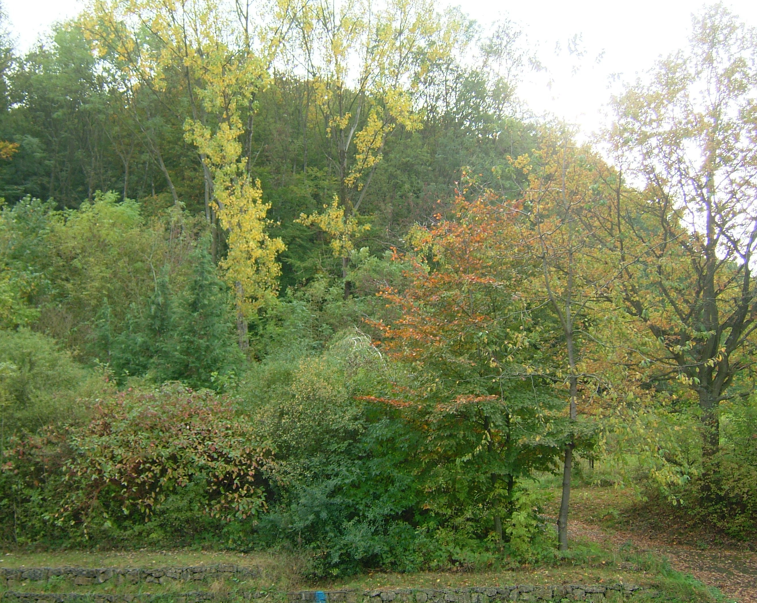 Gaalgebierg op der Scherr